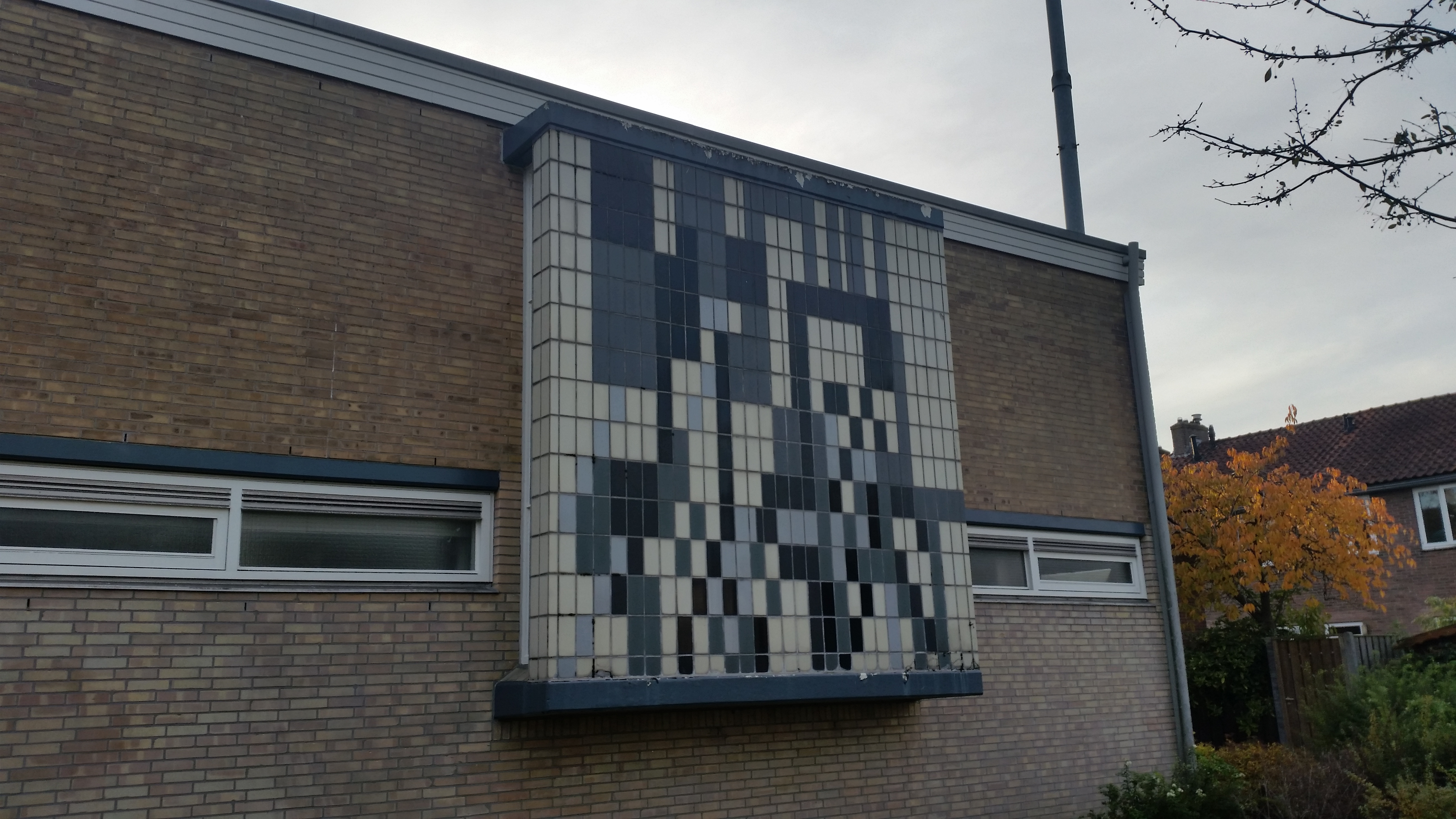 Tegeltableau van Horn op Purmerweg 46